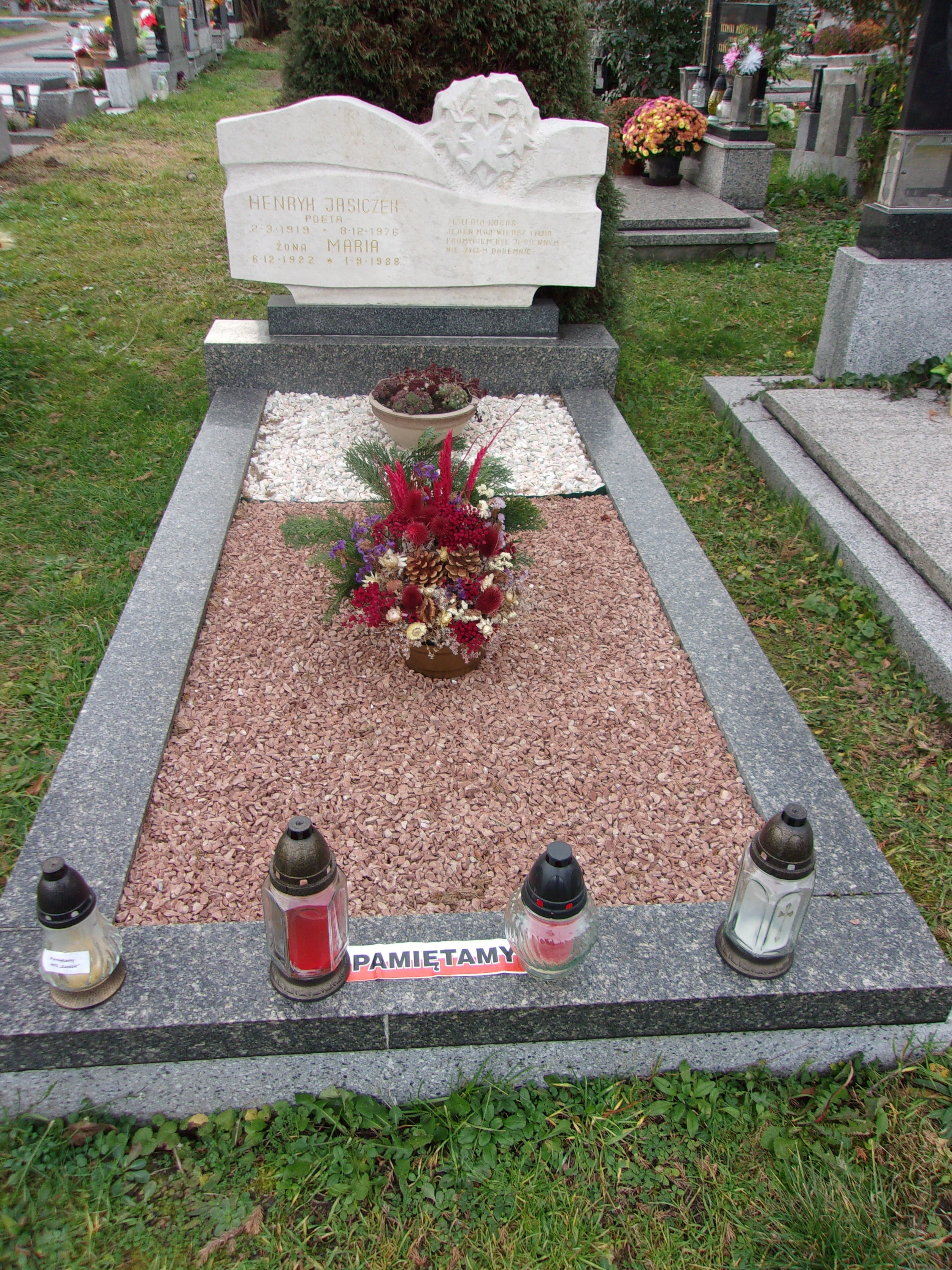 Hrob Henryka Jasiczka a jeho ženy